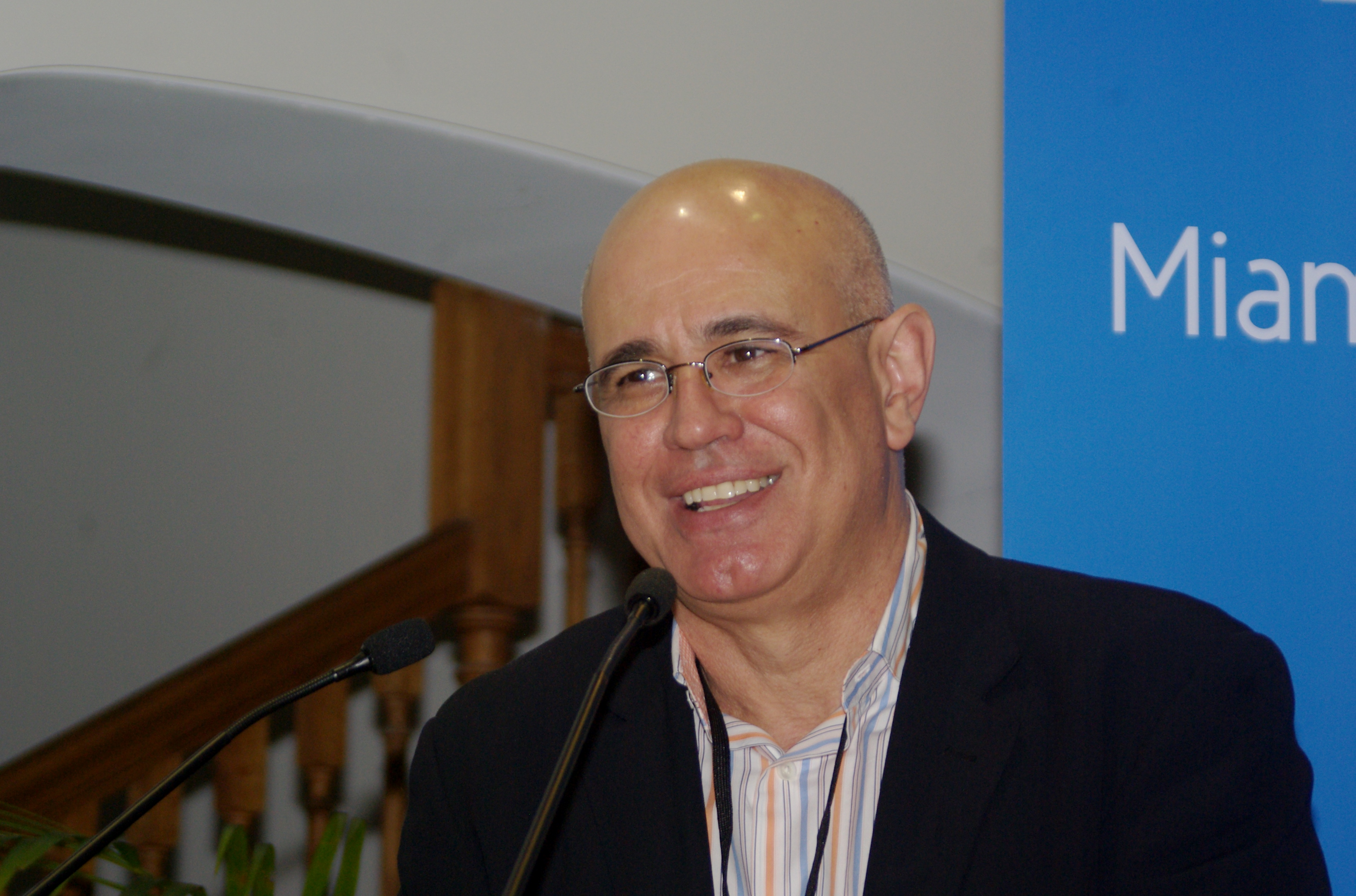 El escritor cubano Antonio Orlando Rodríguez en la Feria Internacional del Libro de Miami 2014